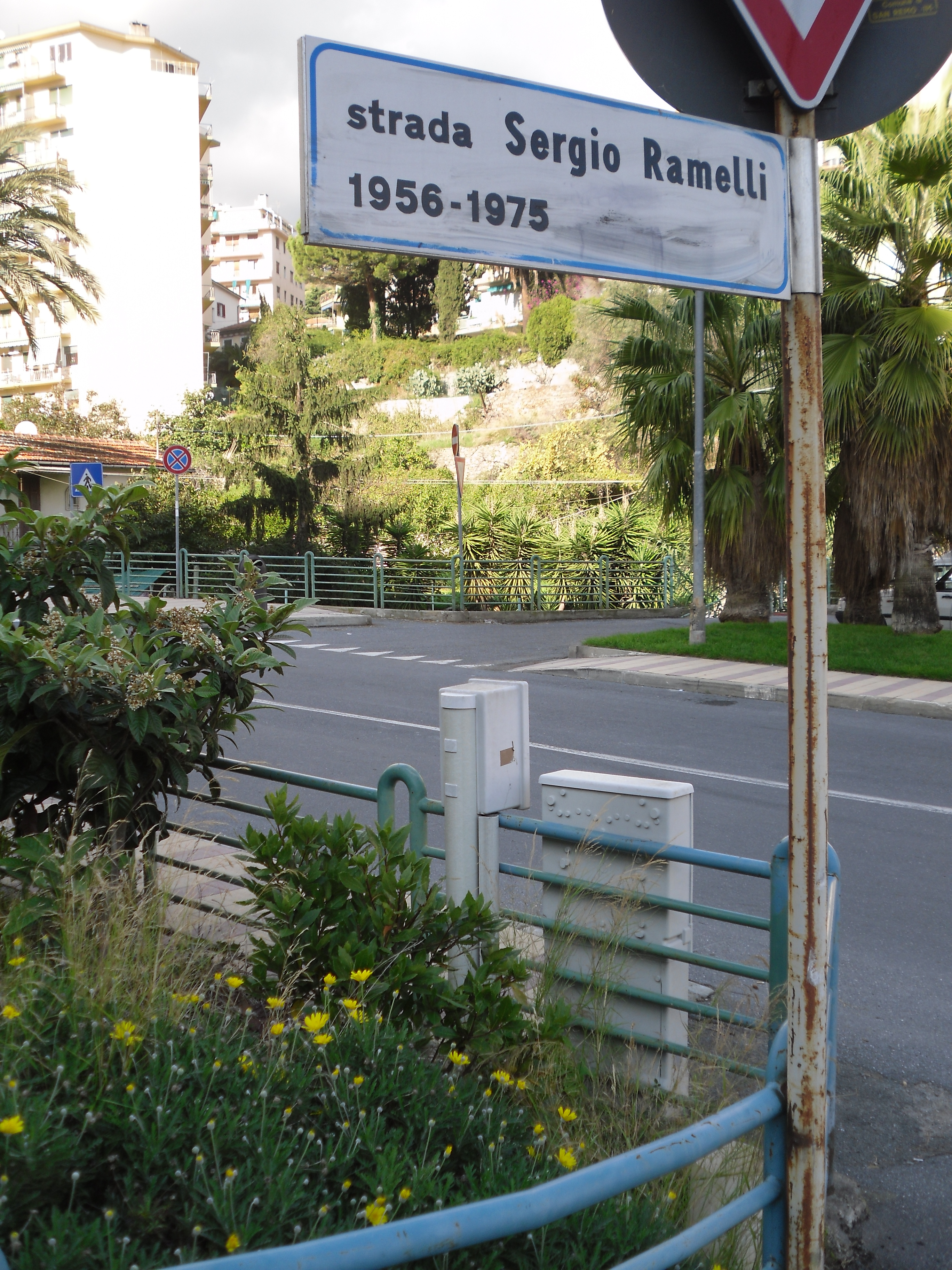 Strada Sergio Ramelli a Sanremo